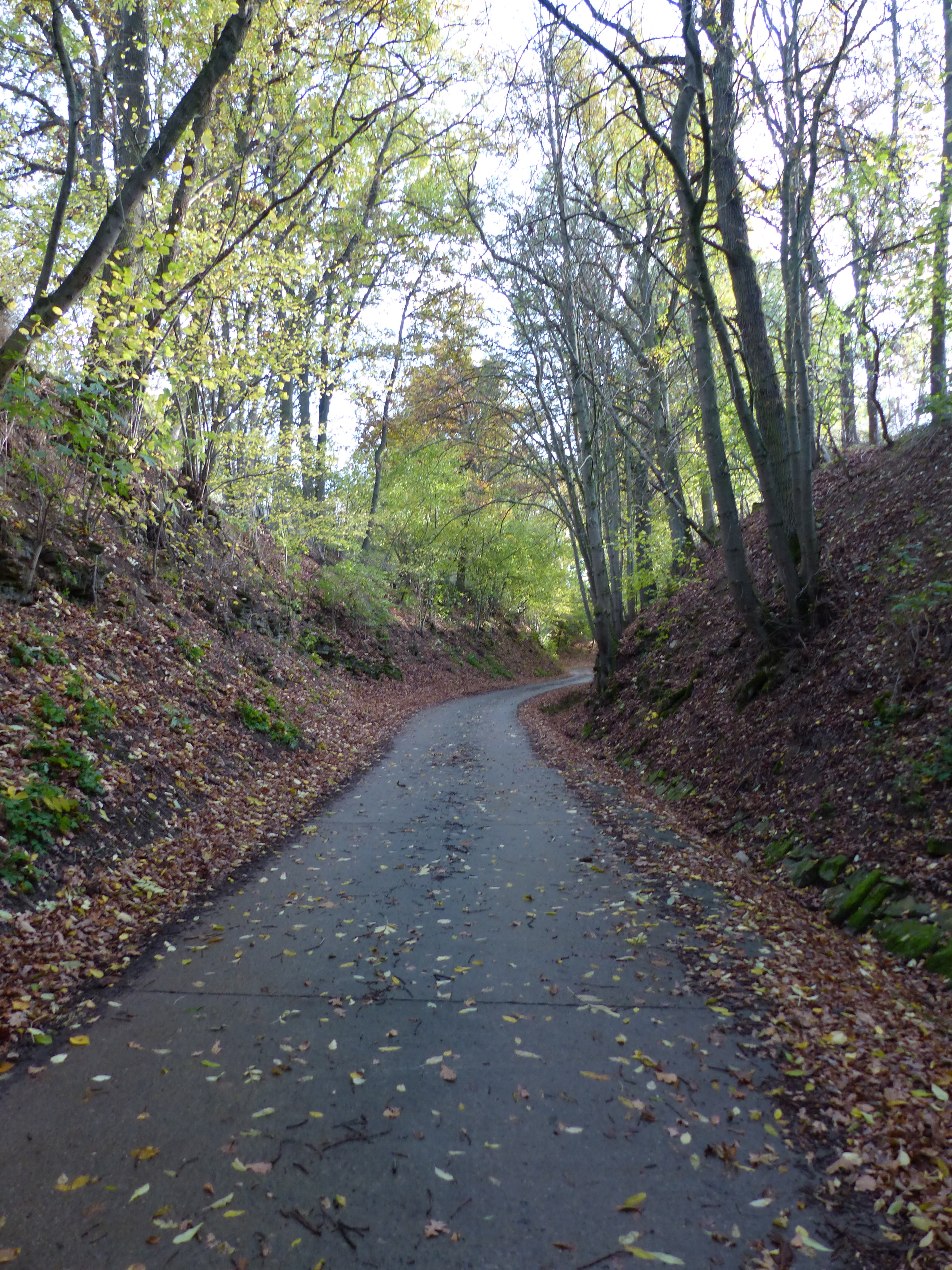 Oberes Ende der am Ochsenfurter Klingentor ins Maintal mündenden Klinge (Klinge = kurzes steiles Seitental)